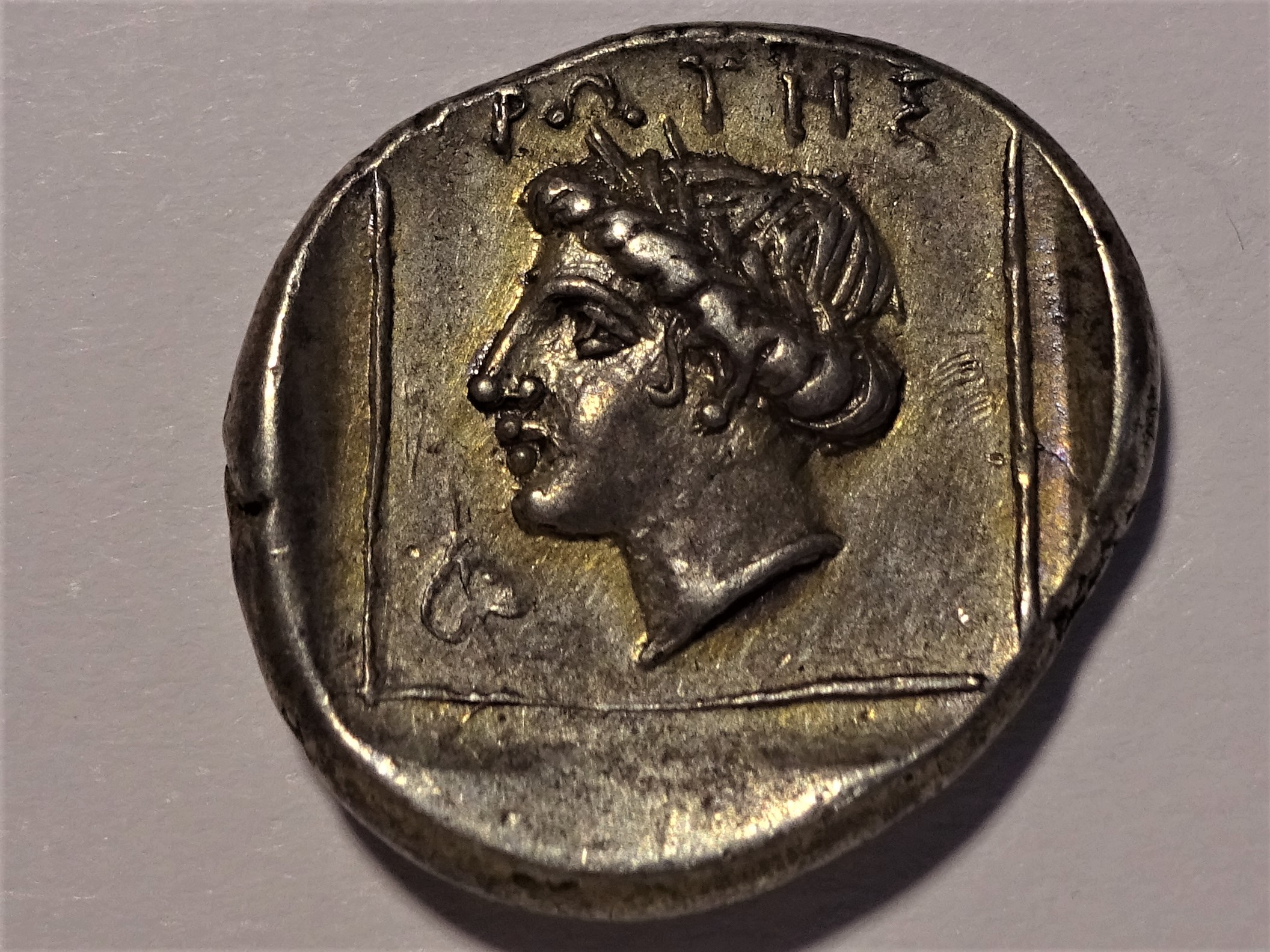 Rückseite des Tetrobols aus Abdera, Magistrat Protes